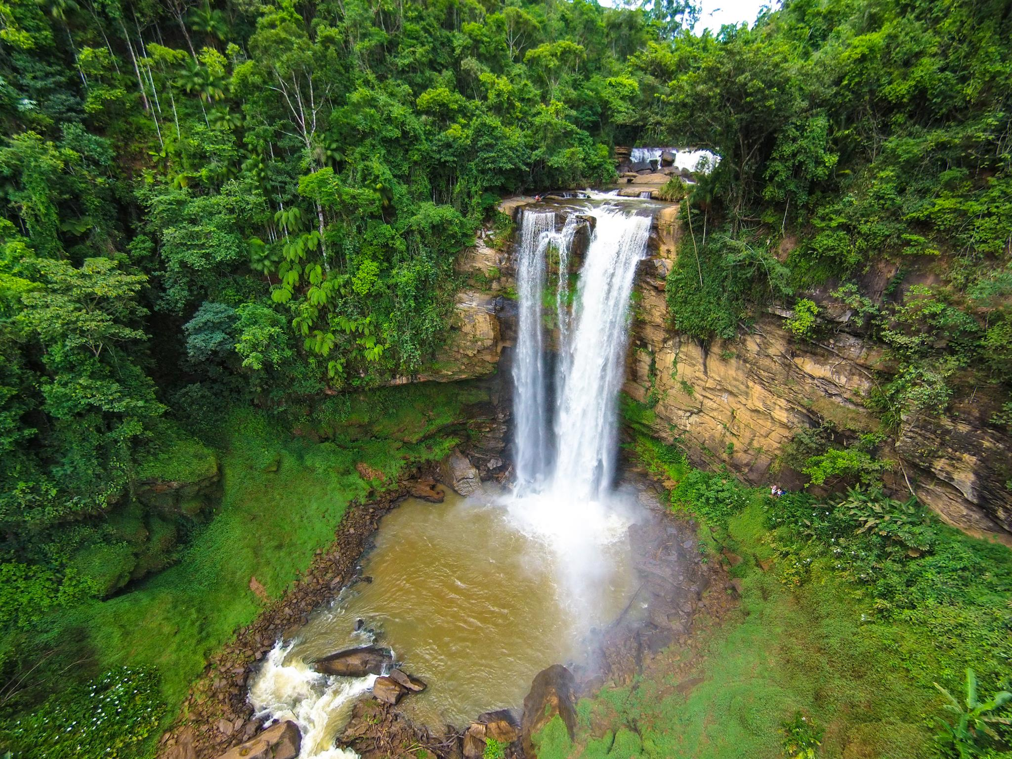 Foto da cachoeira de Matilde, na cidade de Alfredo Chaves, Espírito Santo, feita por drone